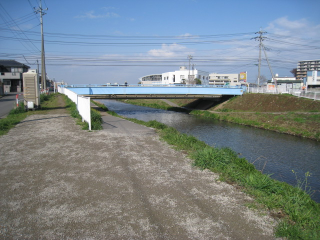 Izumi Bridge on Kuromegawa, Saitama, Japan